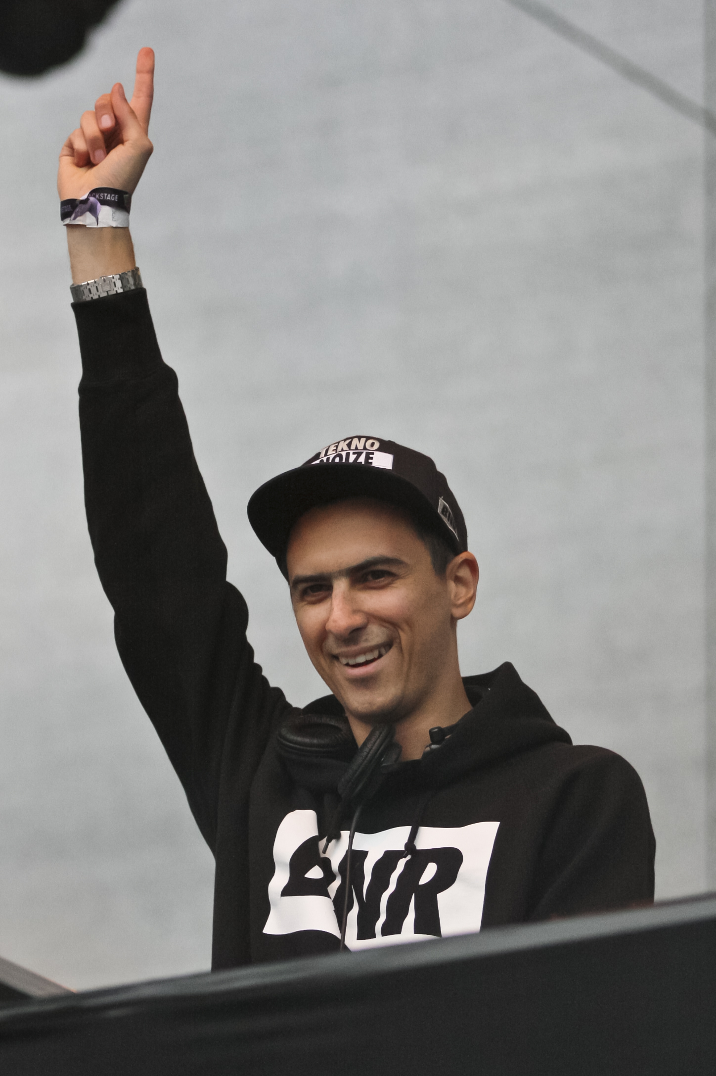 Boys Noize beim Juicy Beats Festival 2011 in Dortmund/Deutschland